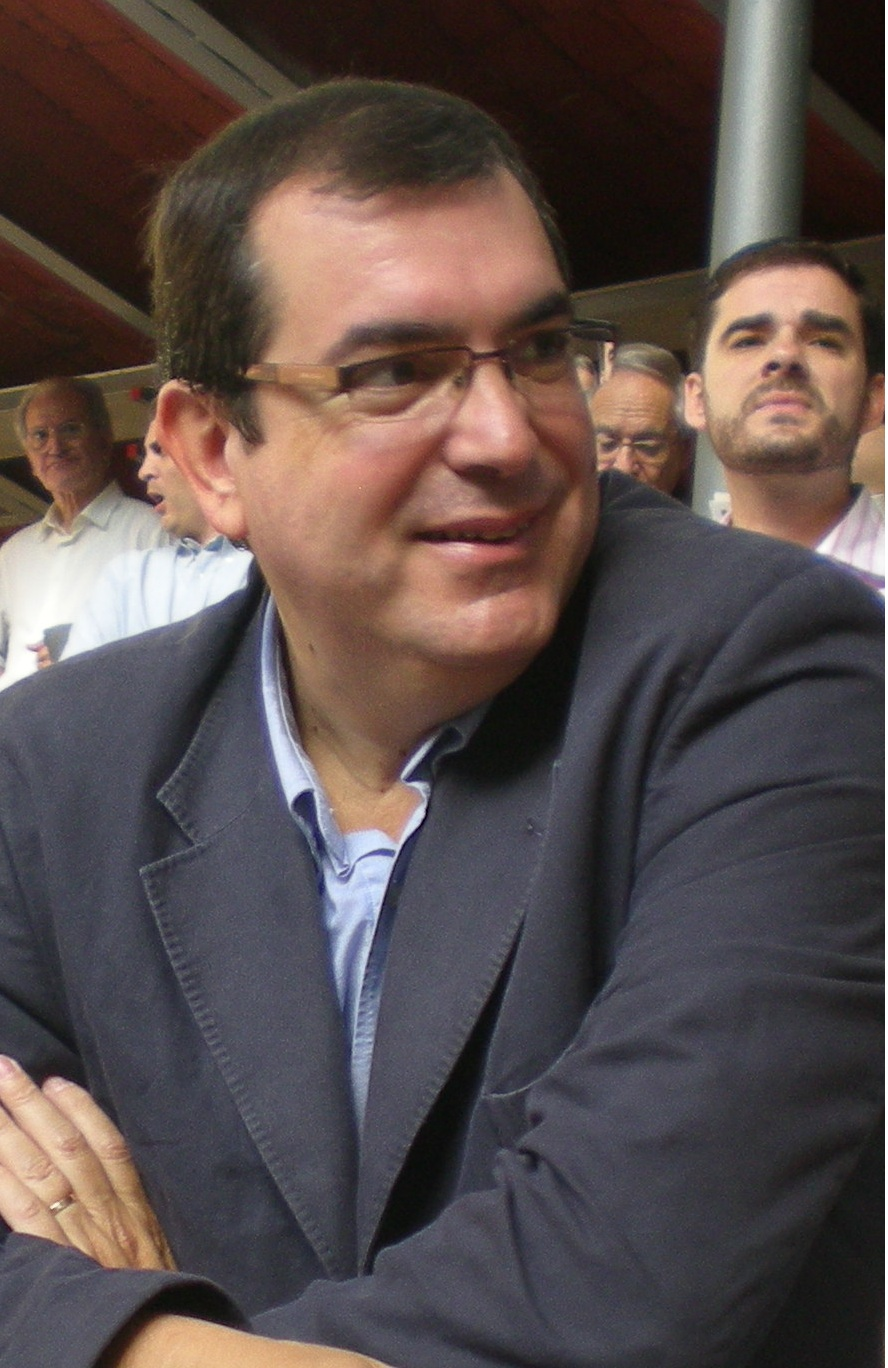 Josep Poblet, Artur Mas, Jordi Jané i Victòria Forns seguint l'actuació castellera